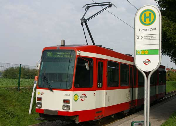 Witten-Heven, Endhaltestelle der Straßenbahn. Haltestelle Heven-Dorf, Startpunkt der laengsten Straßenbahnverbindung in Deutschland.